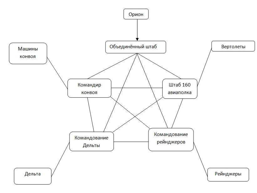 Cтруктура управления в ходе боя 3—4 октября 1993 года